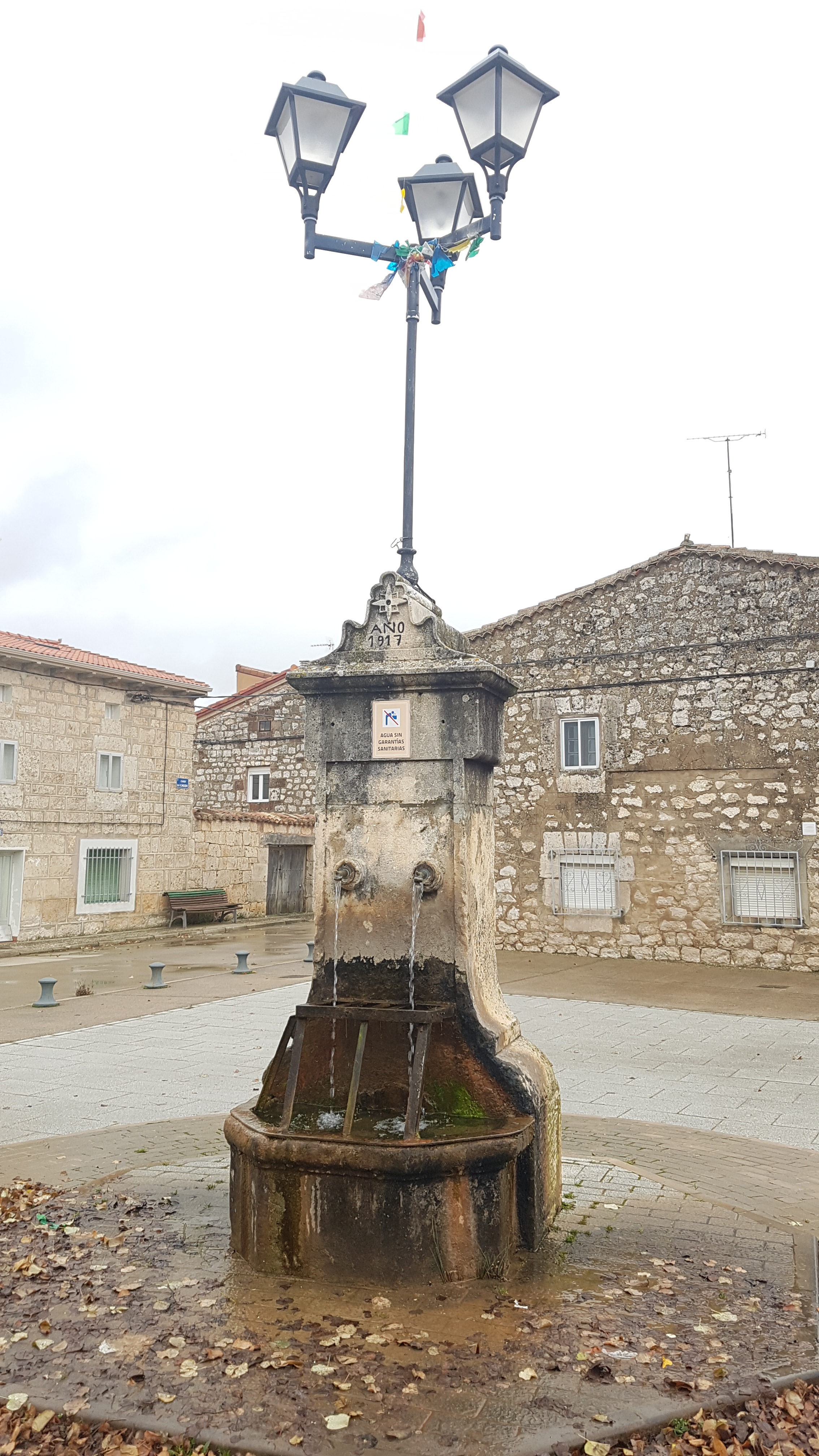 Fuente situada en la localidad de San Millán de Juarros (Burgos-España)